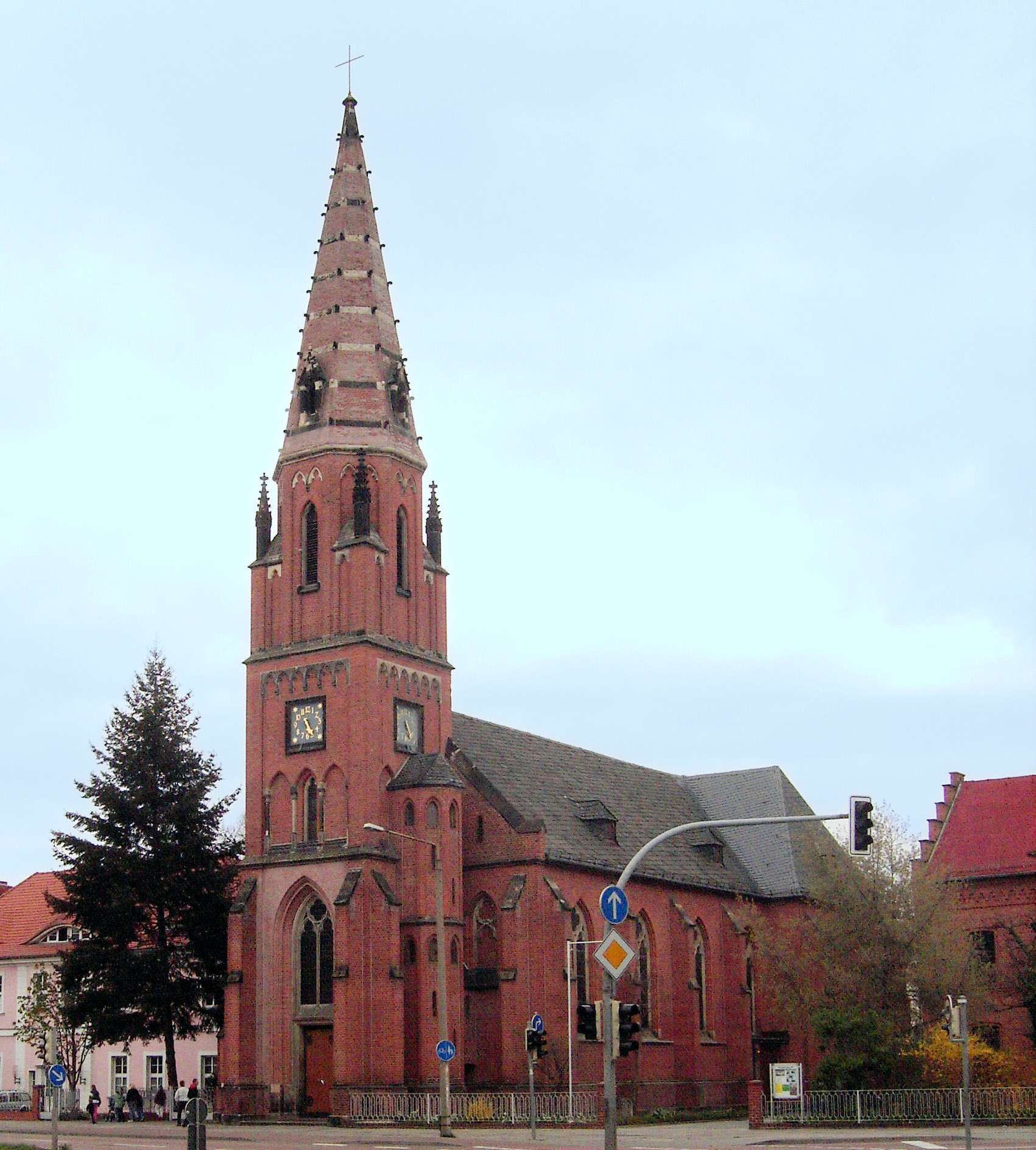 Propsteikirche St. Peter und Paul, Dessau - Katholische Kirche in Dessau